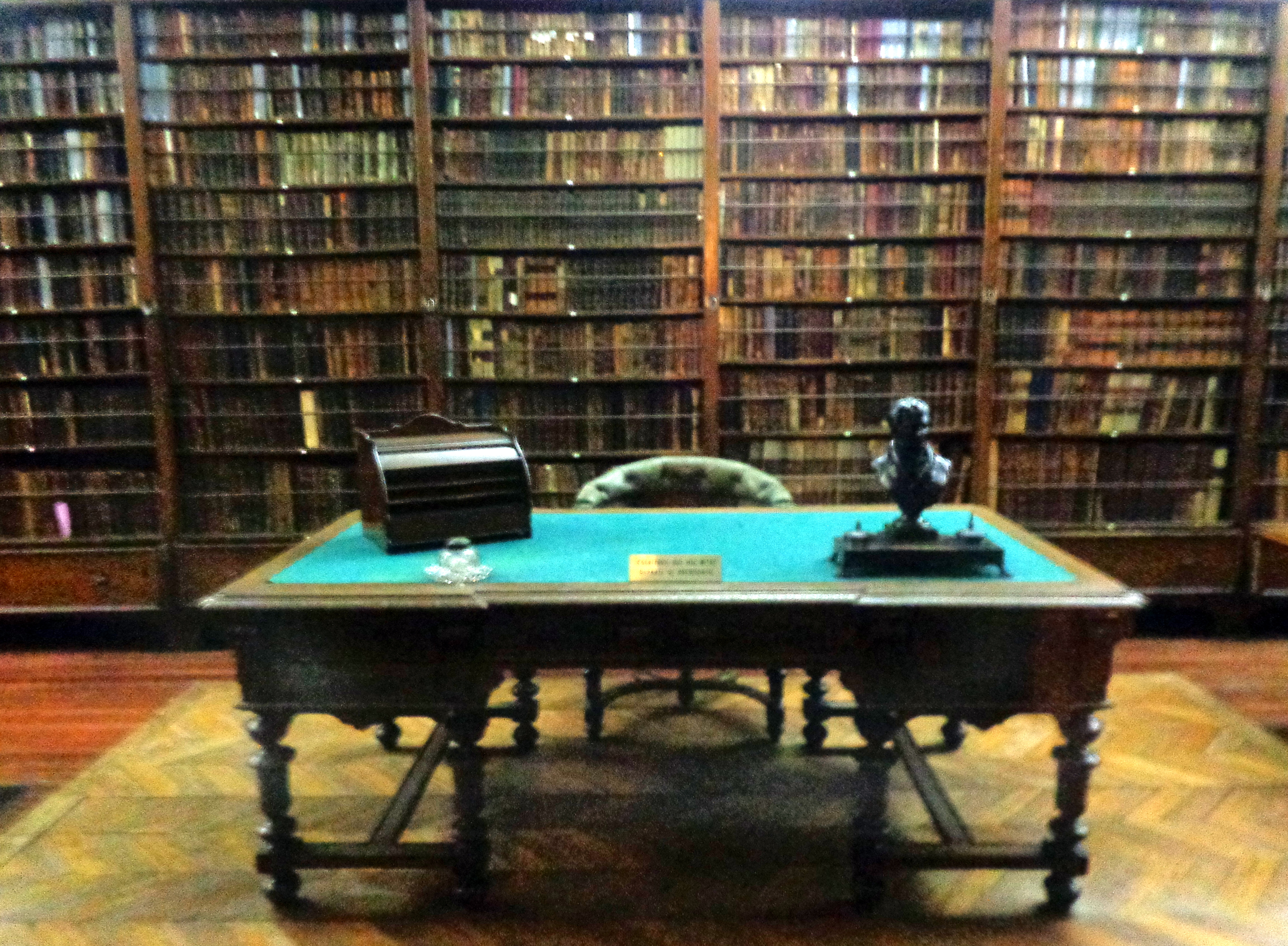 Casa que habitó el General Bartolomé Mitre, actual "Museo Mitre", en Ciudad de Buenos Aires, Argentina.